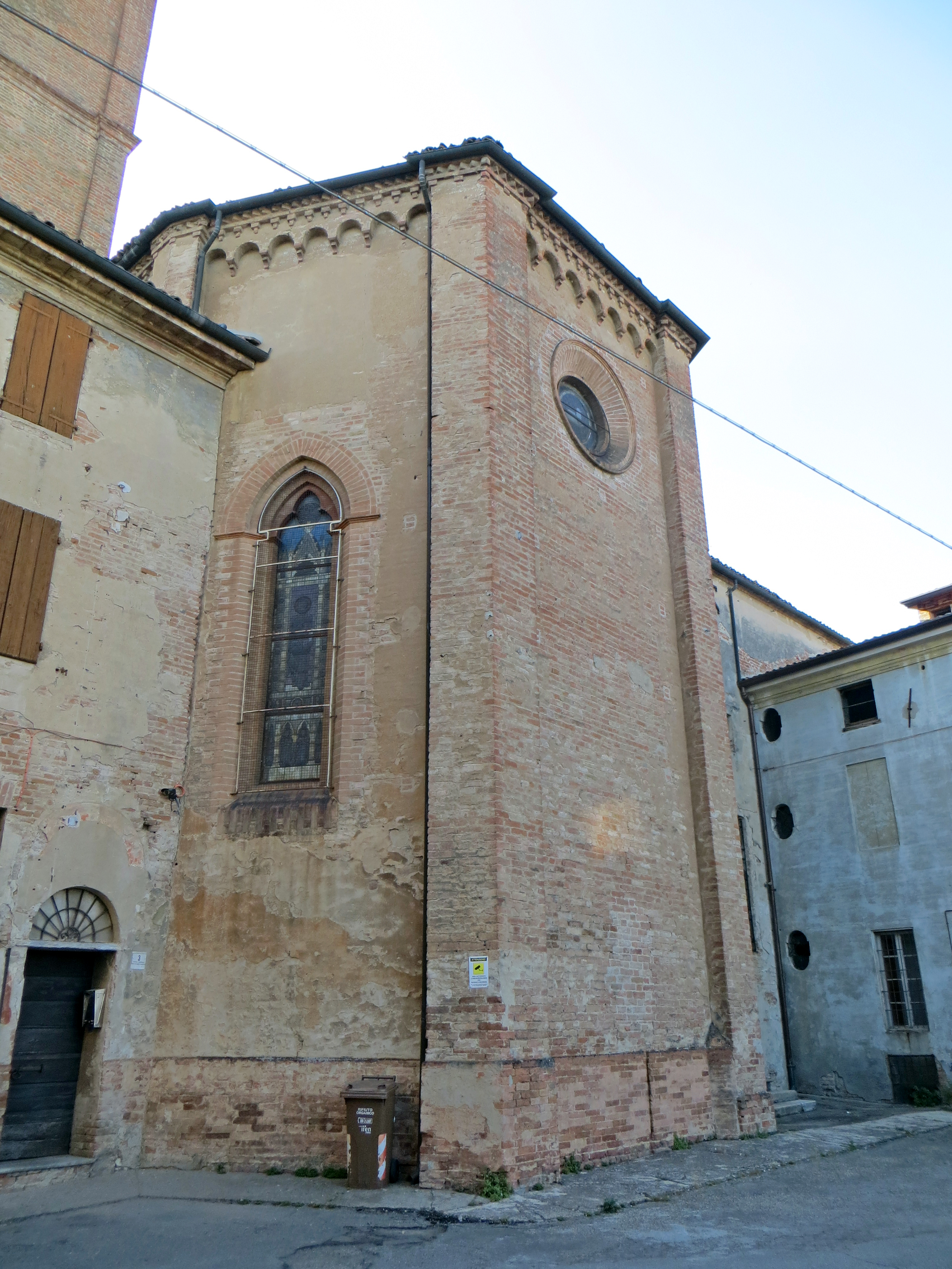 Collegiata di San Bartolomeo Apostolo (Busseto) - abside